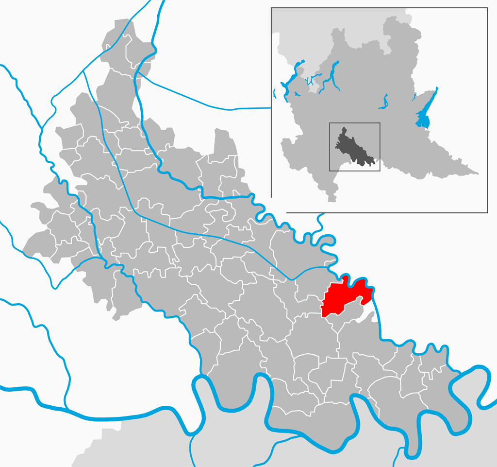 Il comune di Camairago nella provincia di Lodi